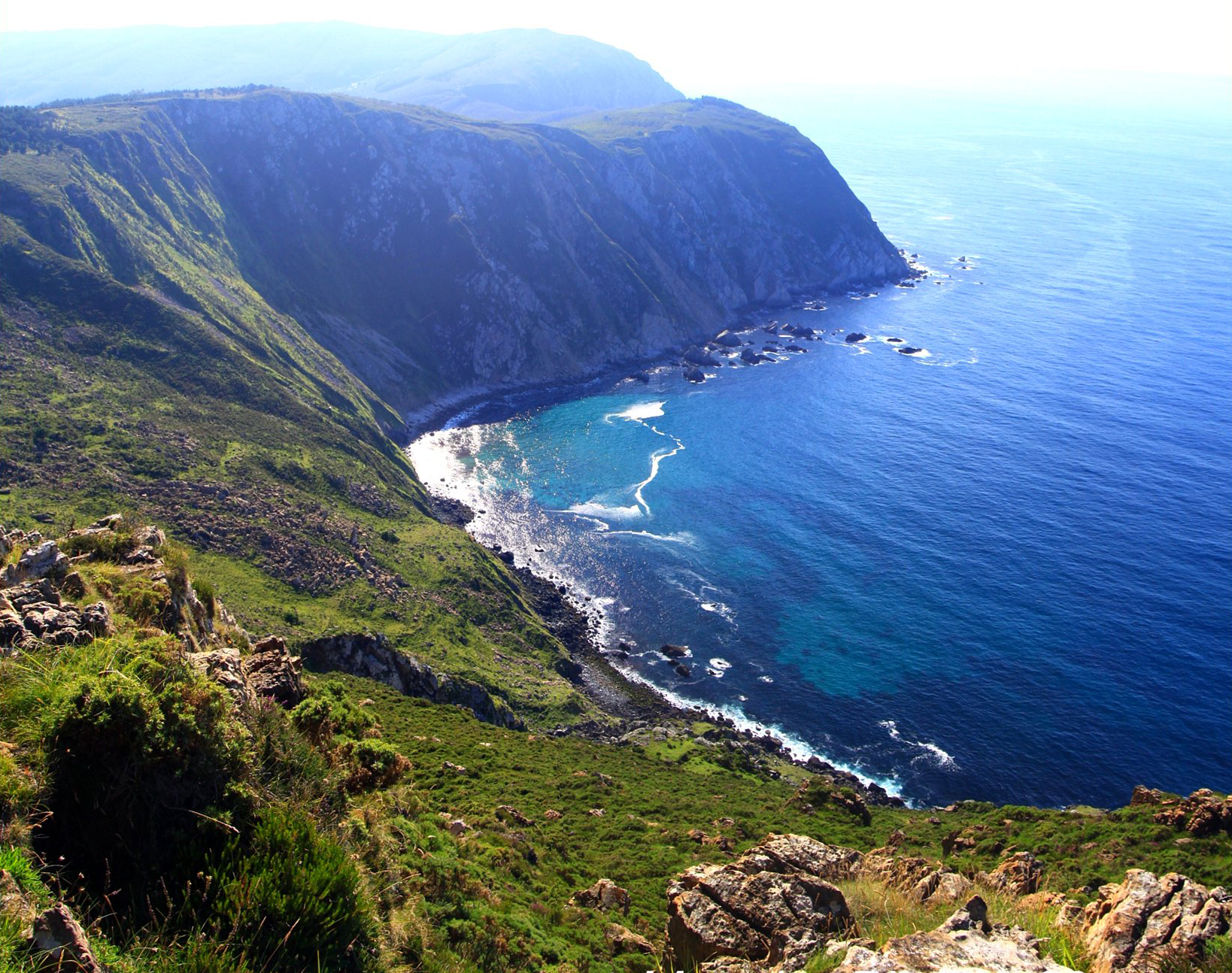 Os cantís máis altos de Europa. Teixido, Cedeira, Galicia (Spain) Los acantilados de San Andrés de Teixido son los mas altos de la Europa continental, con una altura de 612 metros sobre el nivel del mar.